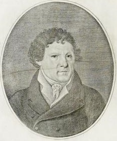 Ritratto di Gabriele Iudica (1760-1835), barone e archeologo scopritore di Akrai, tratto dalla sua pubblicazione commissionata nel 1819